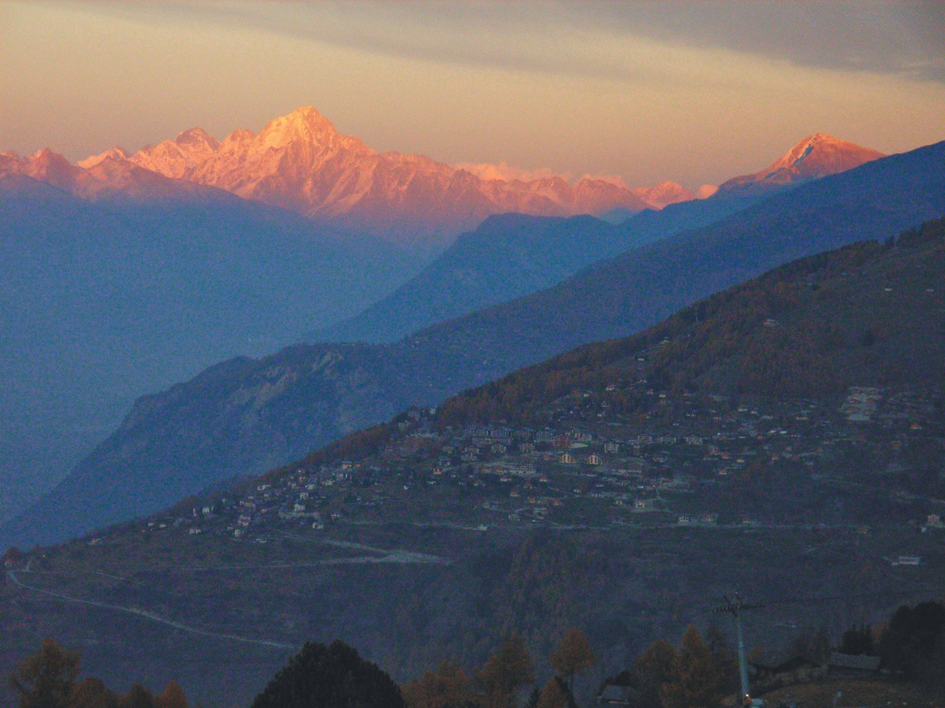 Alpenglühen im Wallis (Blick über Veysonnaz in Richtung Sierre) (Kanton Wallis, Schweiz), im Hintergrund das Bietschhorn